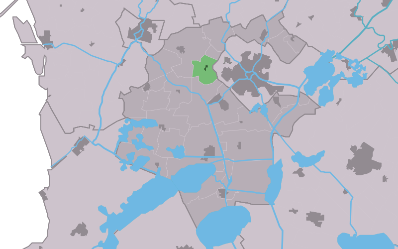 Kaartsje fan himrik fan Folsgeare